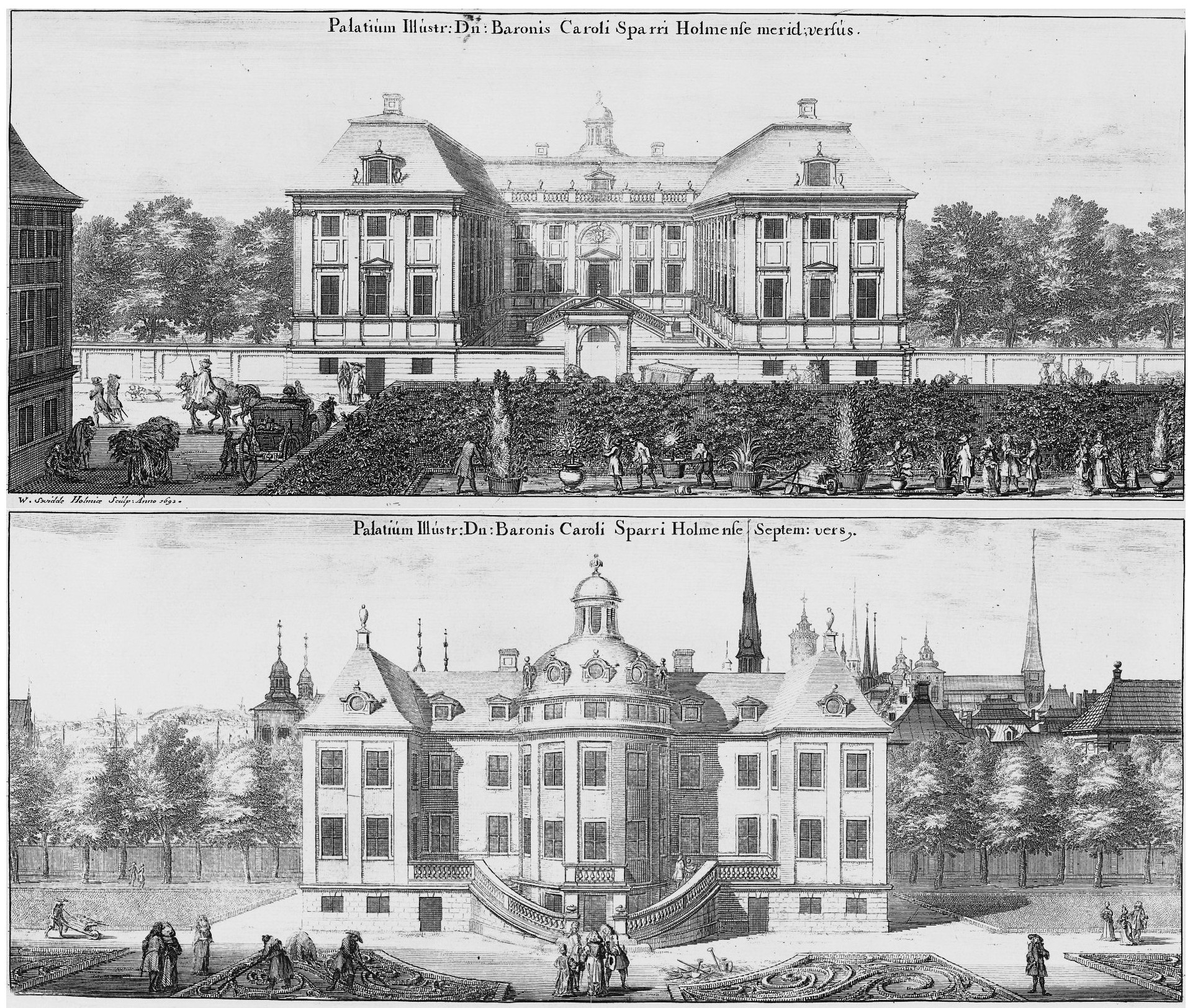 Palatium Illustr. D:n Baronis Caroli Sparri Holmense merid versus = Palatium Illustr. D:n Baronis Caroli Sparri Holmense Septem: versus : [Bild] / W. Swidde Holmiae sculp.